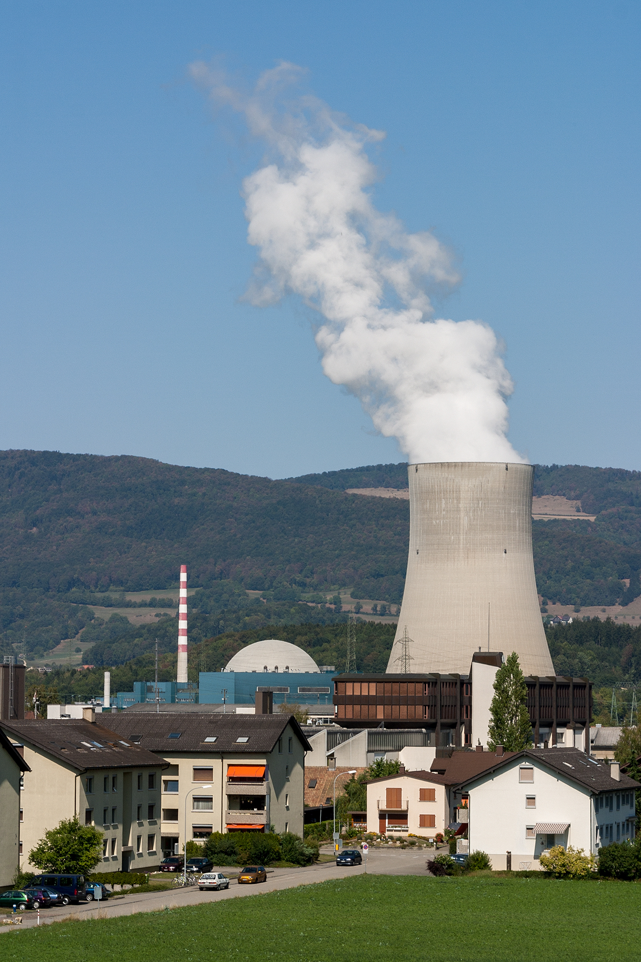 Kühlturm des Kernkraftwerks Niedergösgen